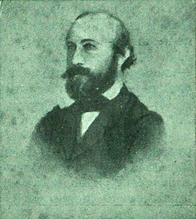 Український письменник, редактор, журналіст, москвофіл Богдан Дідицький.